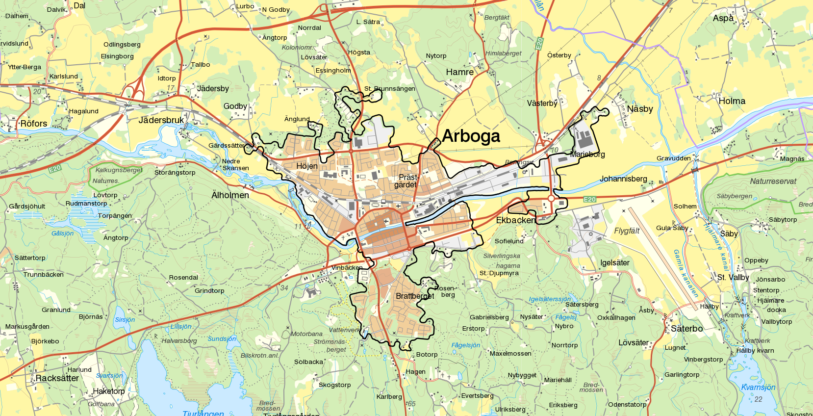 Tätorten Arboga med gränserna från Statistiska centralbyråns tätortsavgränsning 2015 i svart. Bakgrundskarta från Lantmäteriet, skala 1:30 236.